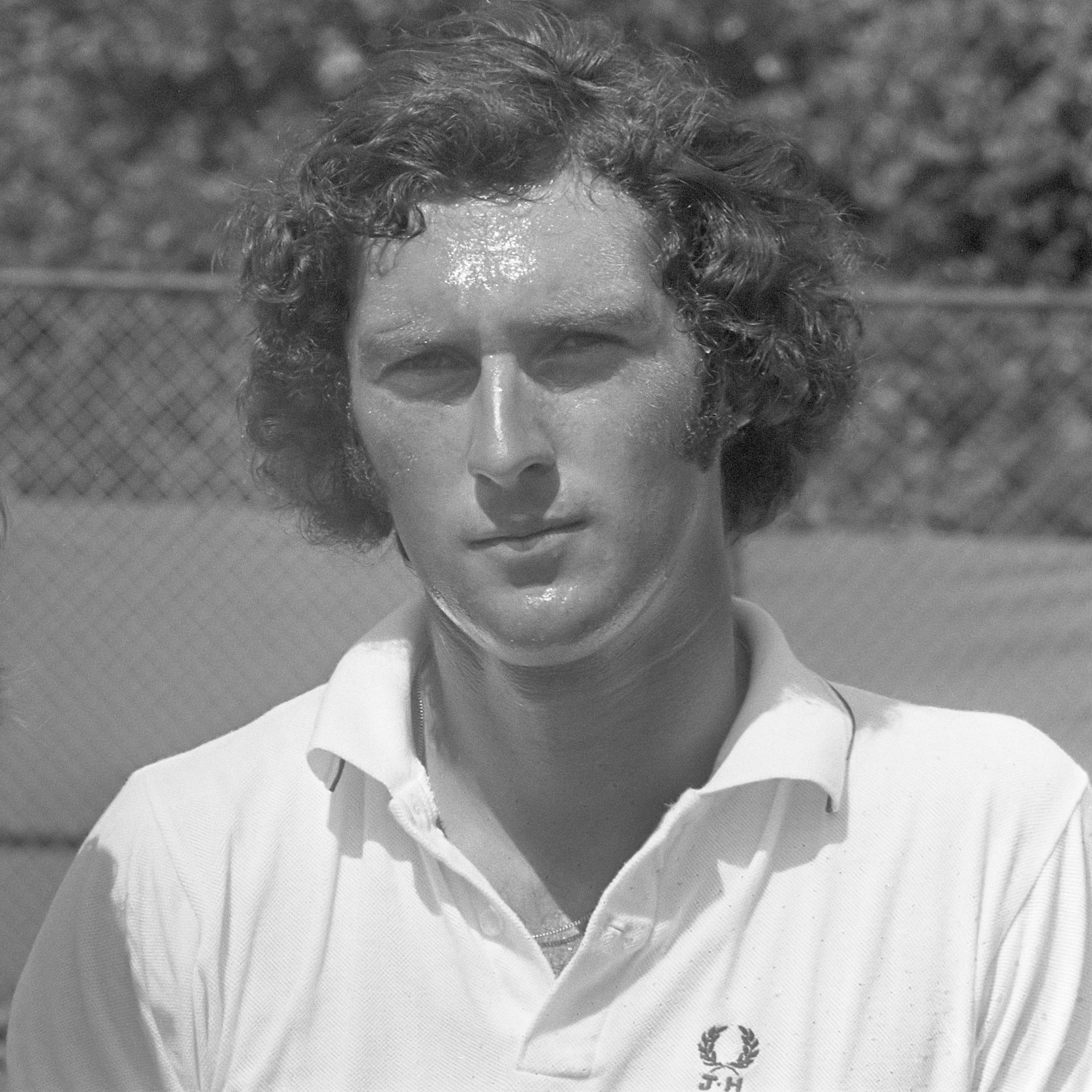 Nationale Kampioenschappen tennis te Scheveningen, Marijke Schaar en Jan Hordijk (koppen) 13 augustus 1973